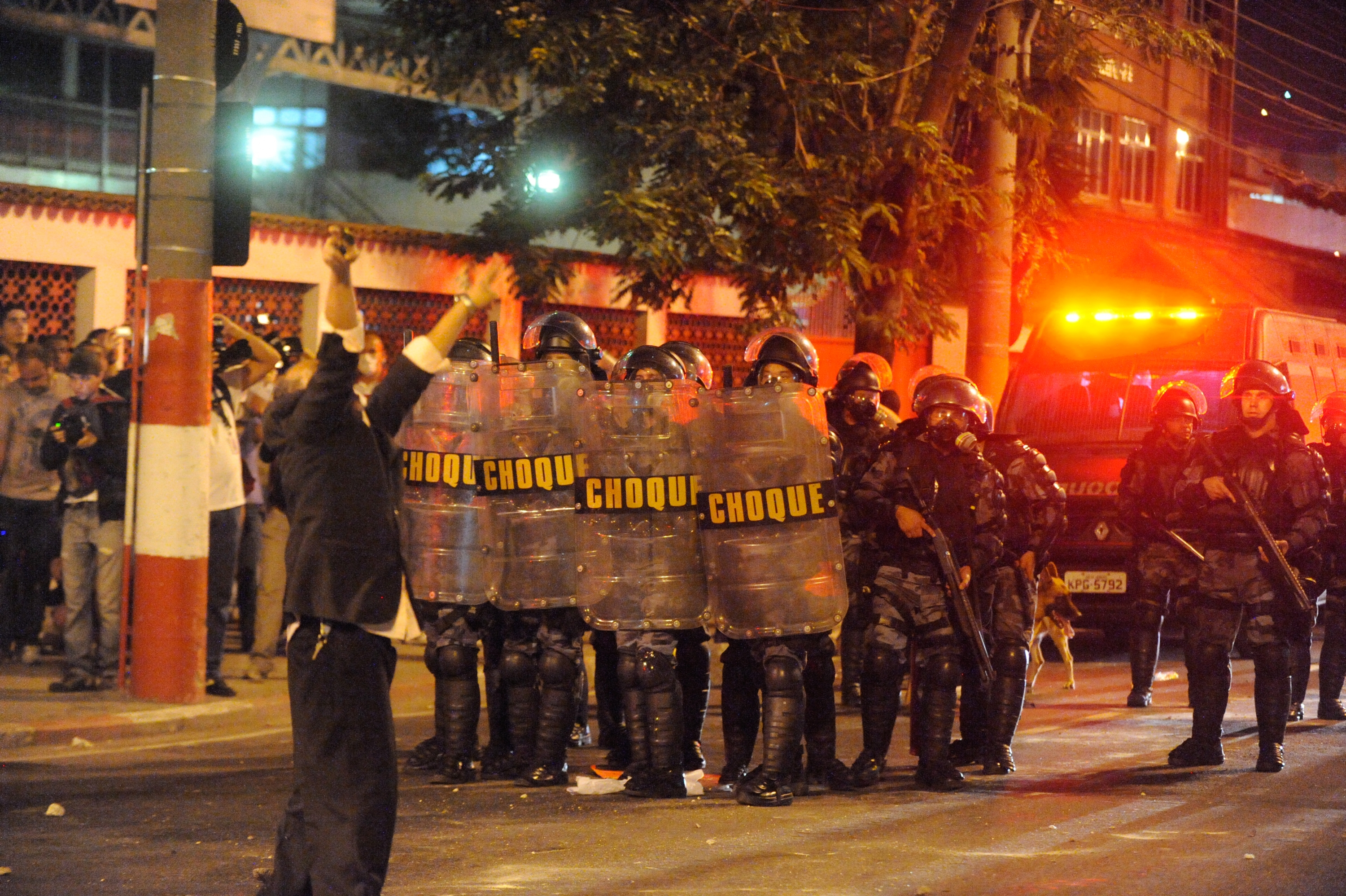 Niterói (RJ) – A Tropa de Choque da Polícia Militar utilizou bombas de efeito moral e gás lacrimogênio e alguns policias chegaram a sacar armas durante a confusão para retirar os manifestantes da avenida. Os confrontos continuam no centro de Niterói.